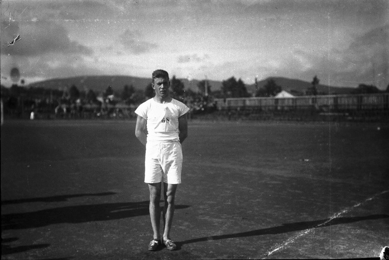 Norwegian athlete Sverre Helgesen at Frogner stadion in Oslo, Norway